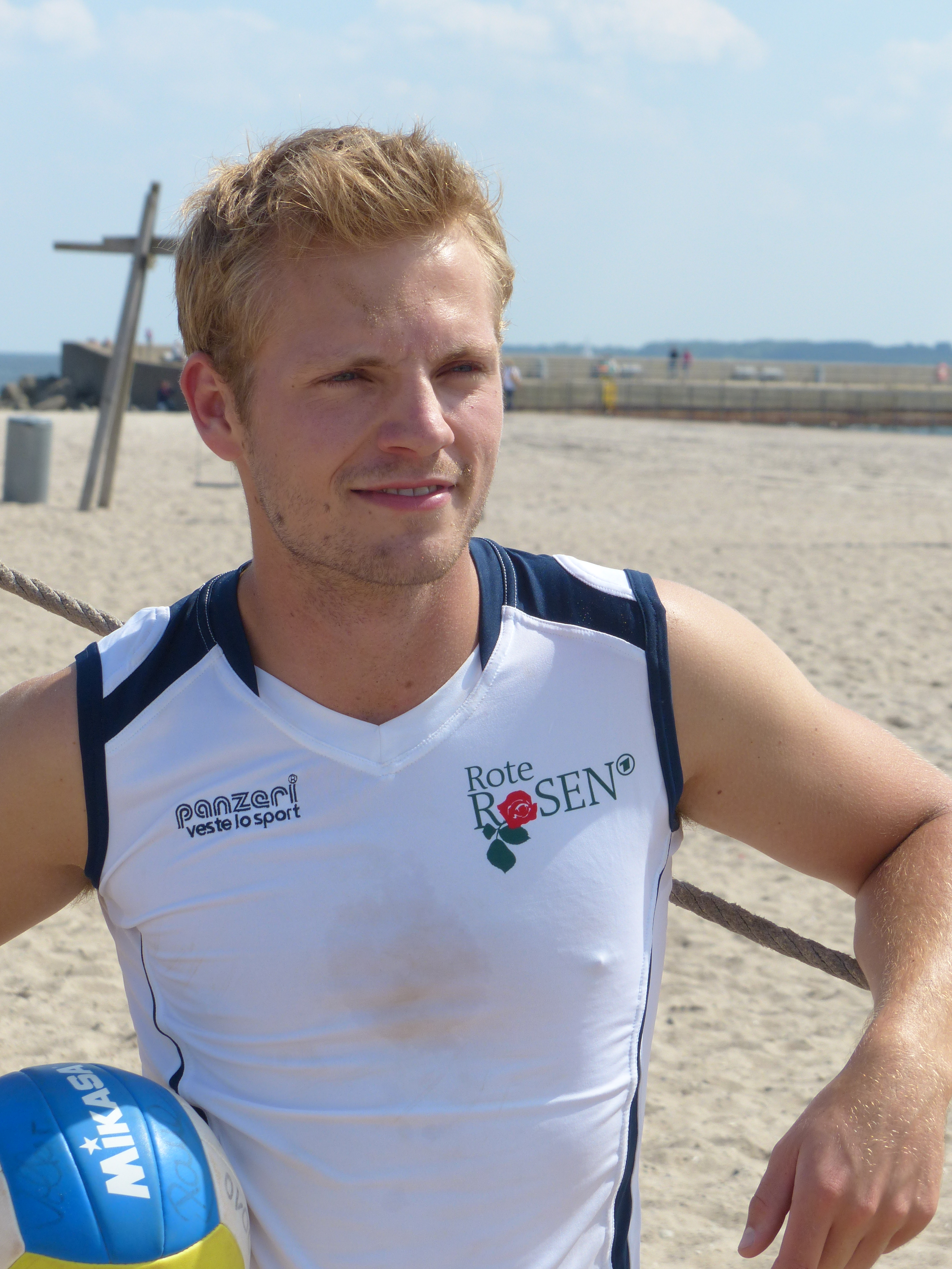 Niklas Osterloh beim Fotoshooting zum Beachvolleyball-Starcup 2013